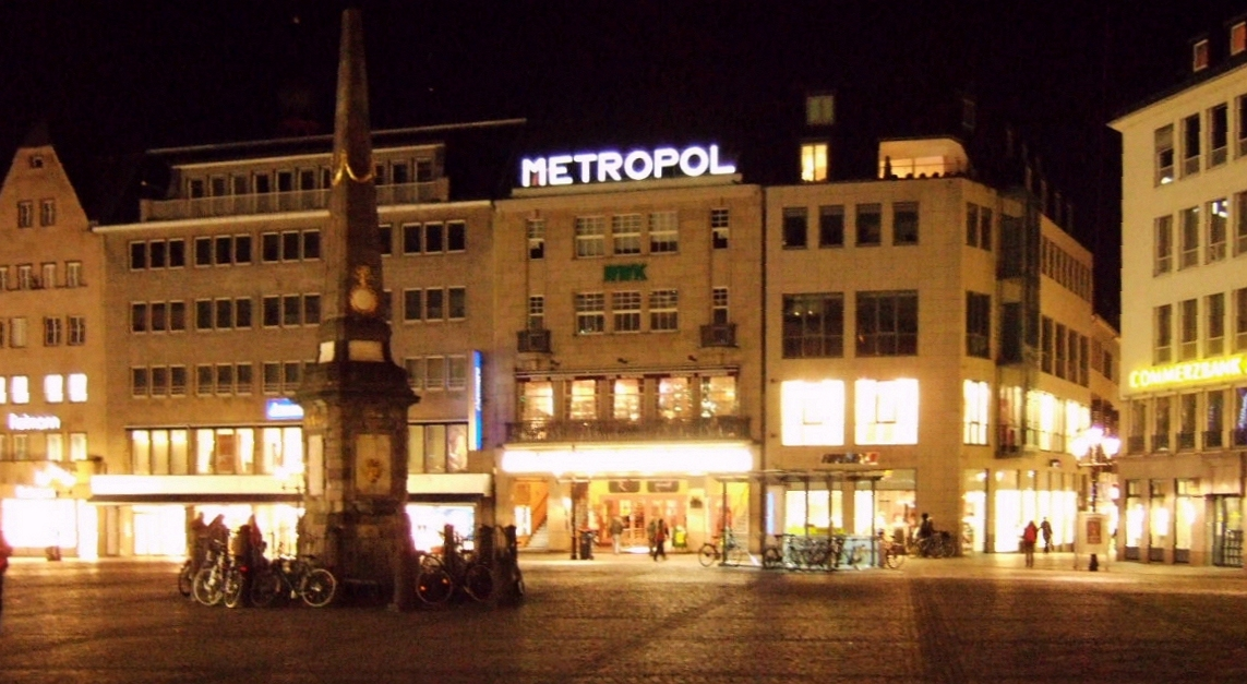 Ansicht des Bonner Marktes bei Nacht. Blick auf das Metropol-Kino.